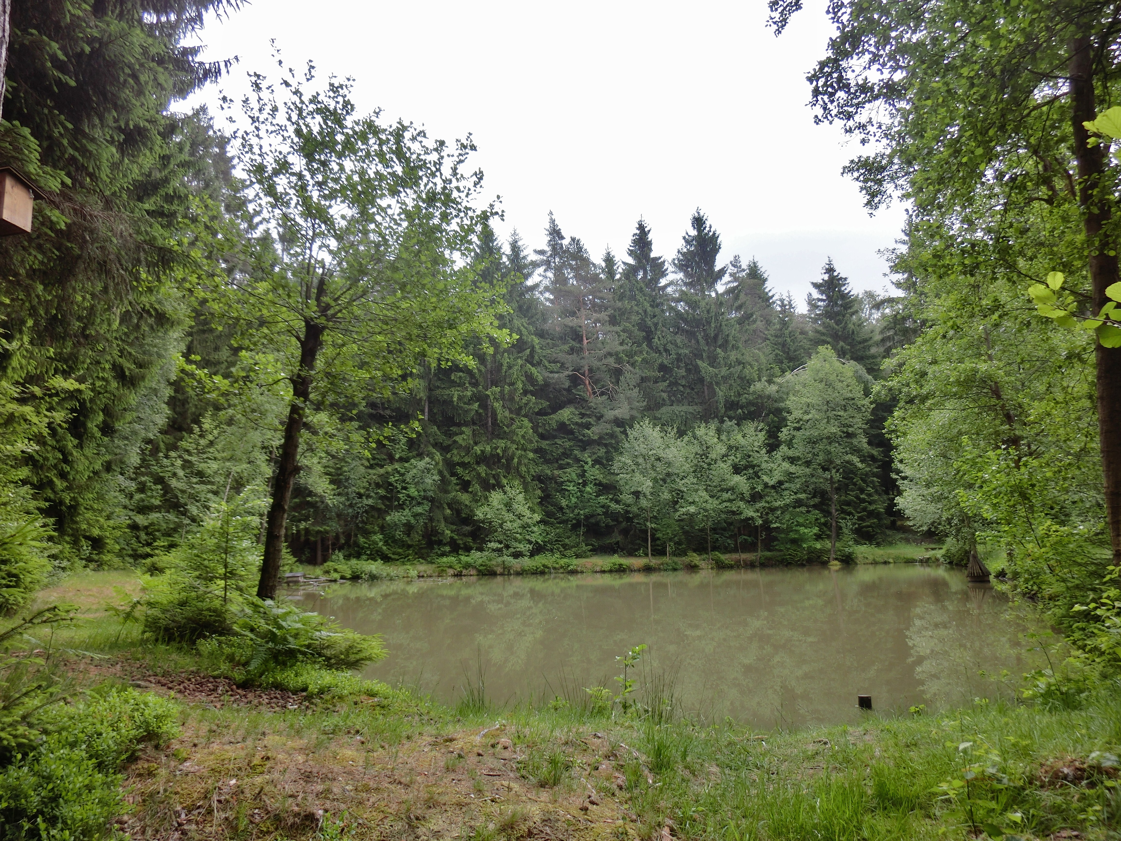 Püttlachweiher 2